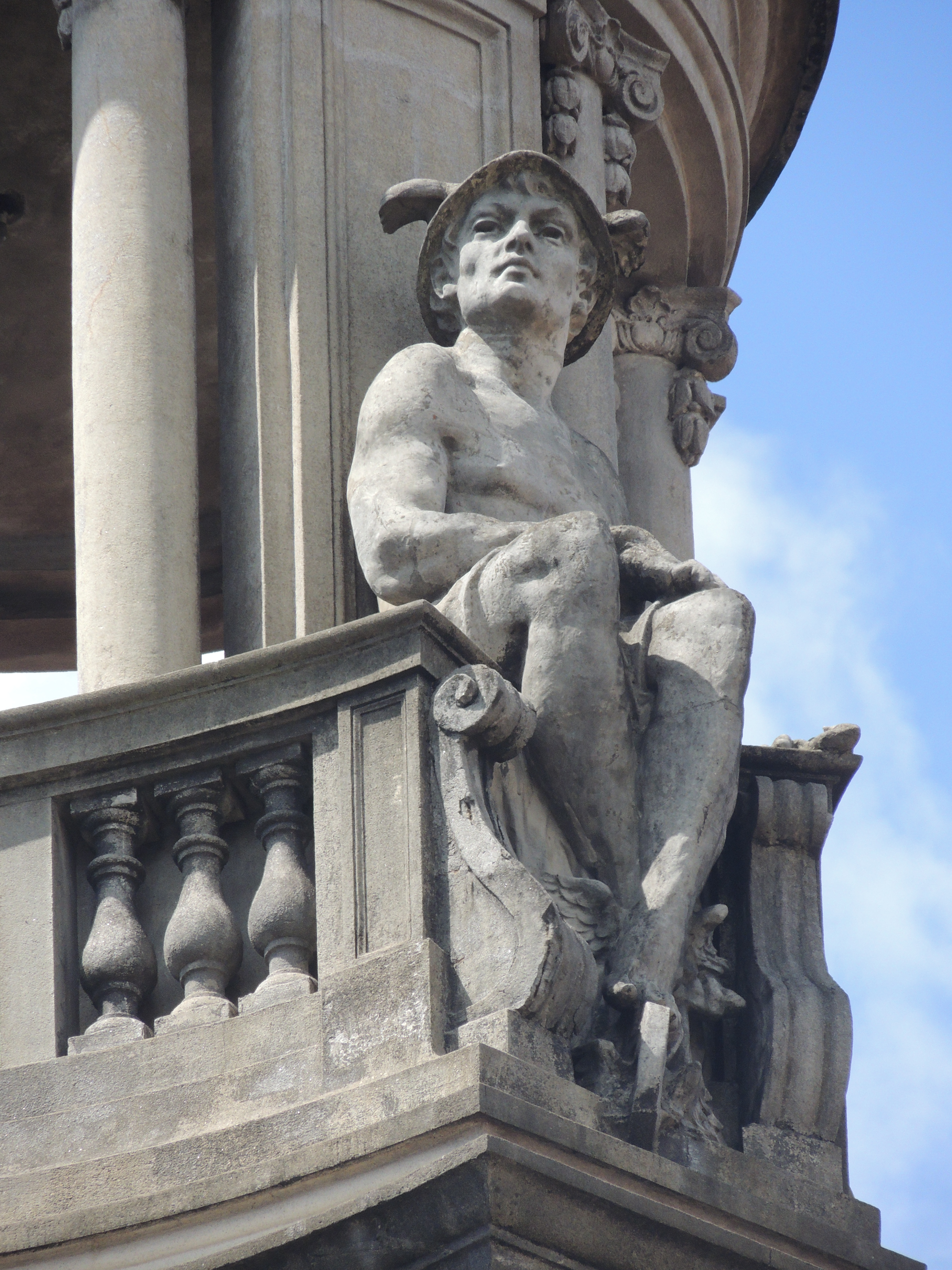 Integra um conjunto de estátuas na torre da Bolsa de Café na cidade de Santos. As estátuas têm cerca de 4,5 m de altura e são feitas em cimento. Moldadas por Van Emelen em seu ateliê no Palácio das Indústrias, São Paulo, em 1922, as estátuas teriam sido inauguradas só em 1923 depois da inauguração da Bolsa, pois a torre ainda estava em construção.